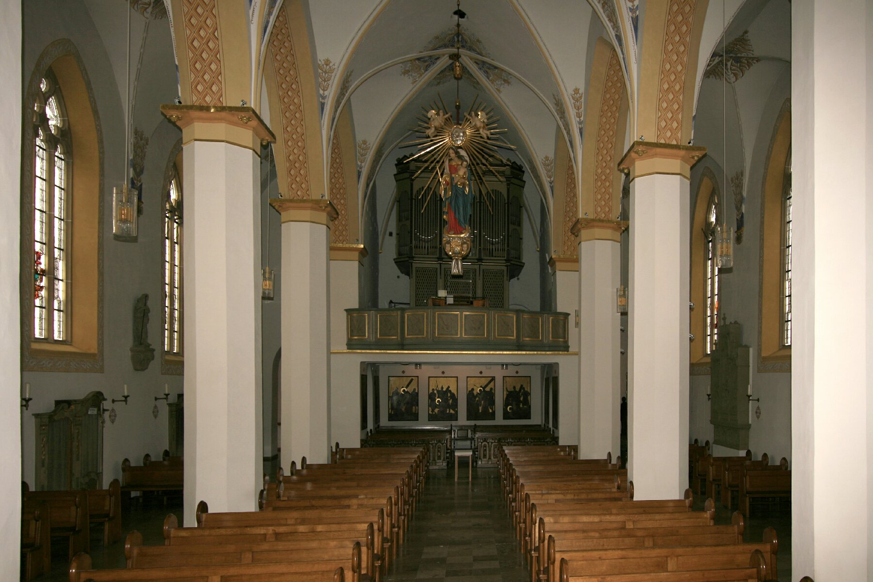 Orgel in der Kirche St. Walburga in Meschede